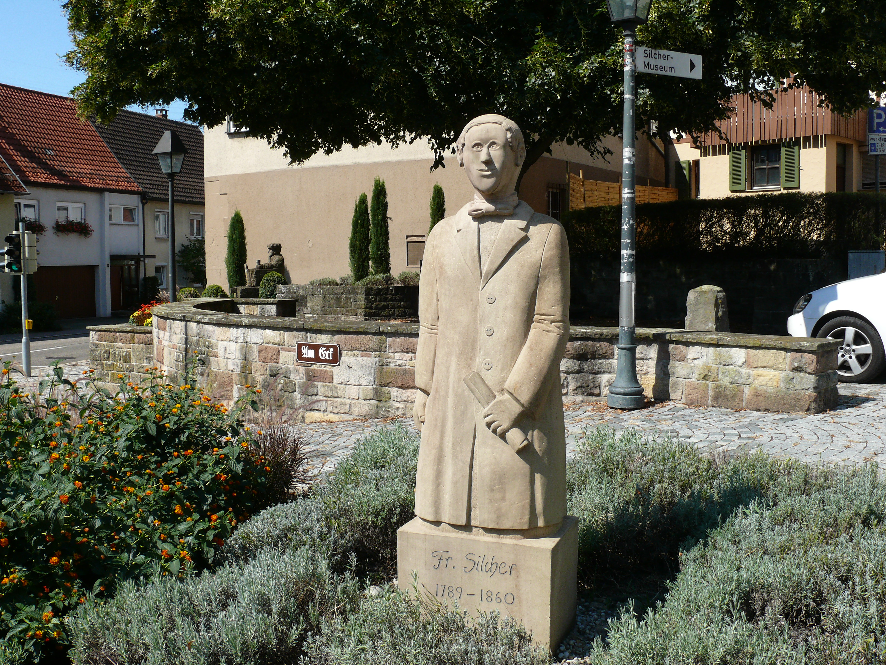 Weiteres Denkmal zu Ehren von Friedrich Silcher in Weinstadt-Schnait.